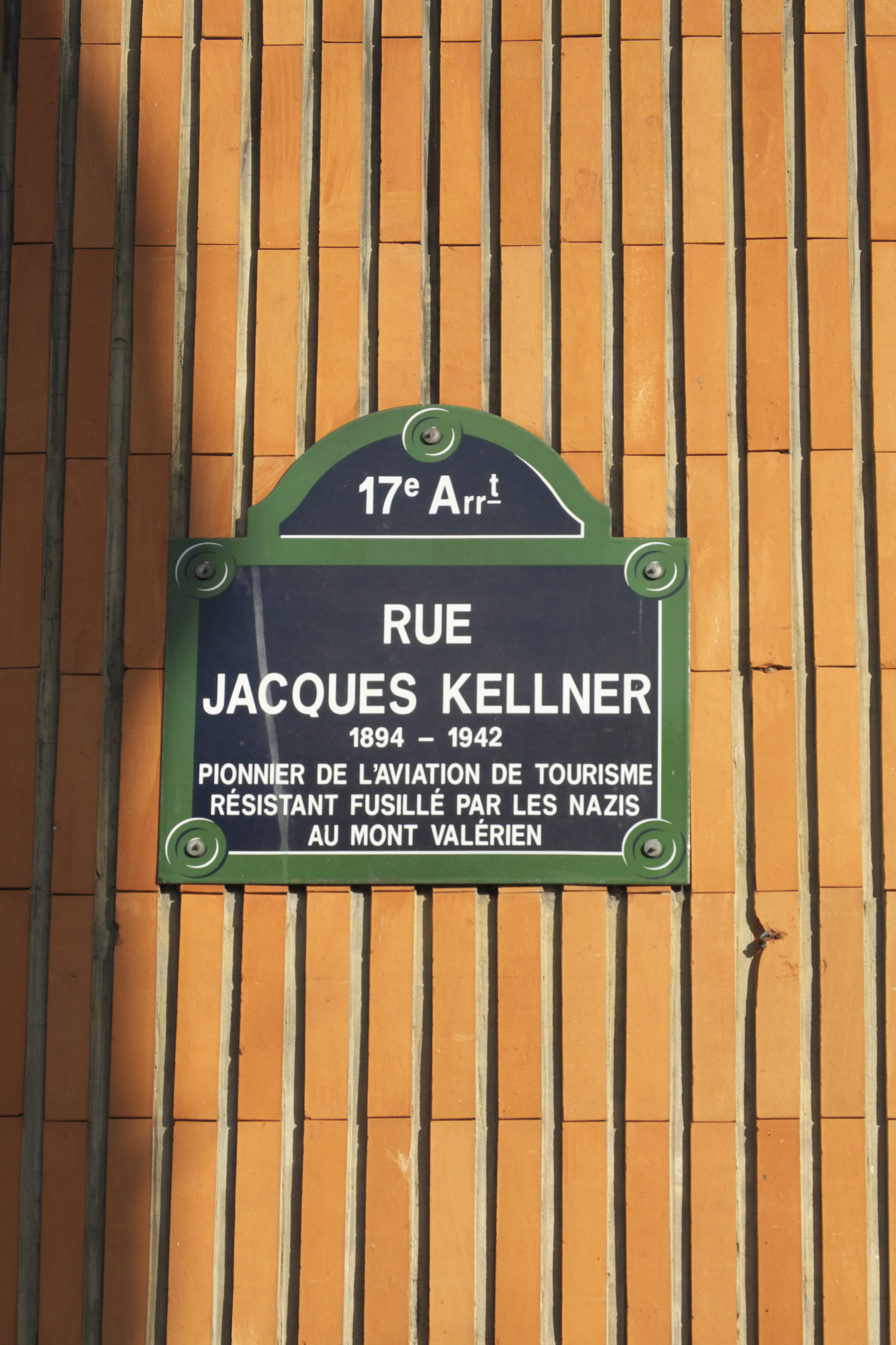 Straßenschild Rue Jacques Kellner, im 17. Arrondissement in Paris (Île-de-France/Frankreich)